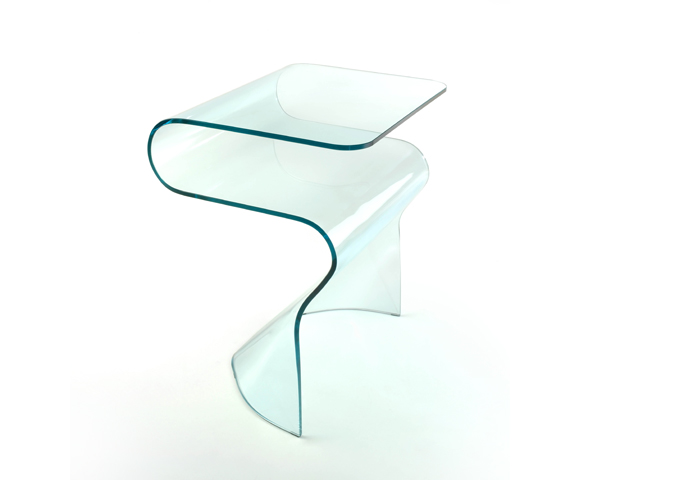 TOKI